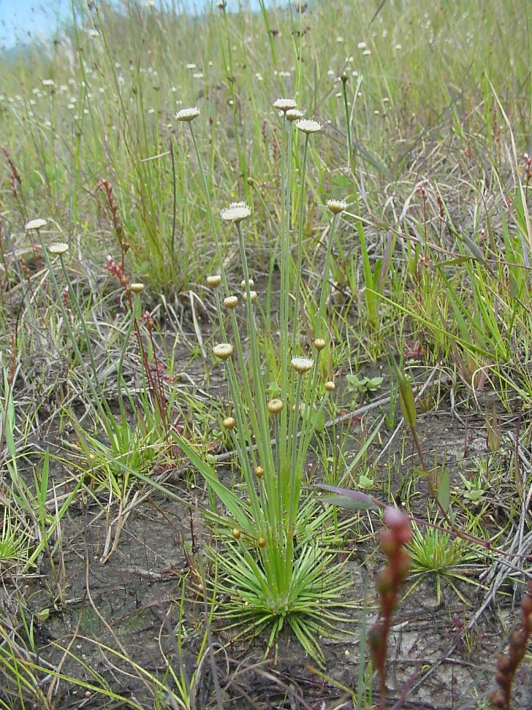 Syngonanthus chrysanthus - ERIOCAULACEAE - Praia do Sonho - Palho�a - SC - Brasil